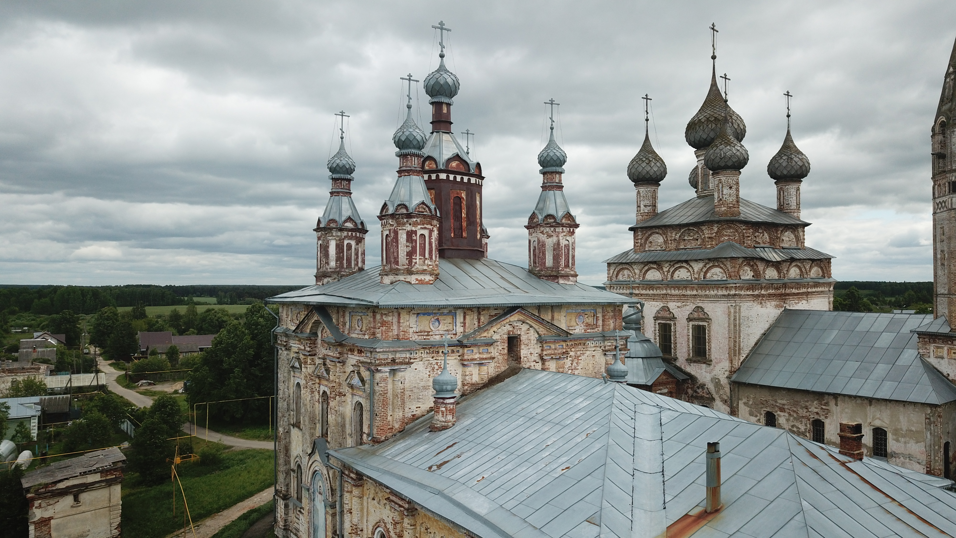 Общий вид